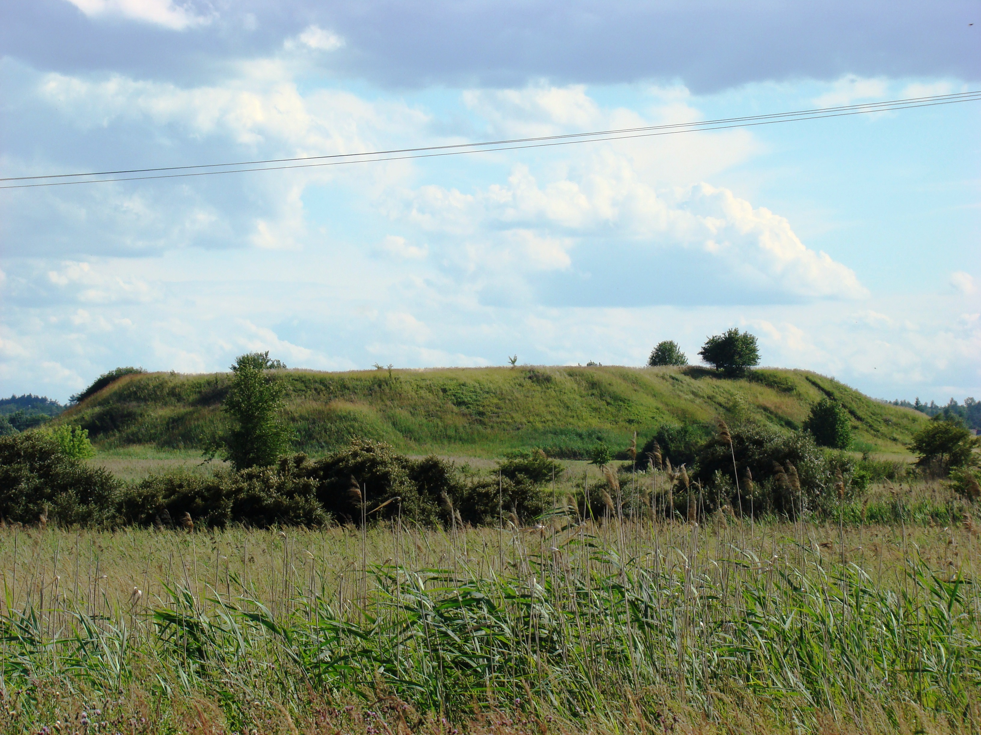 Hałda kopalni rud żelaza "Piotr" w Jastrzębiu